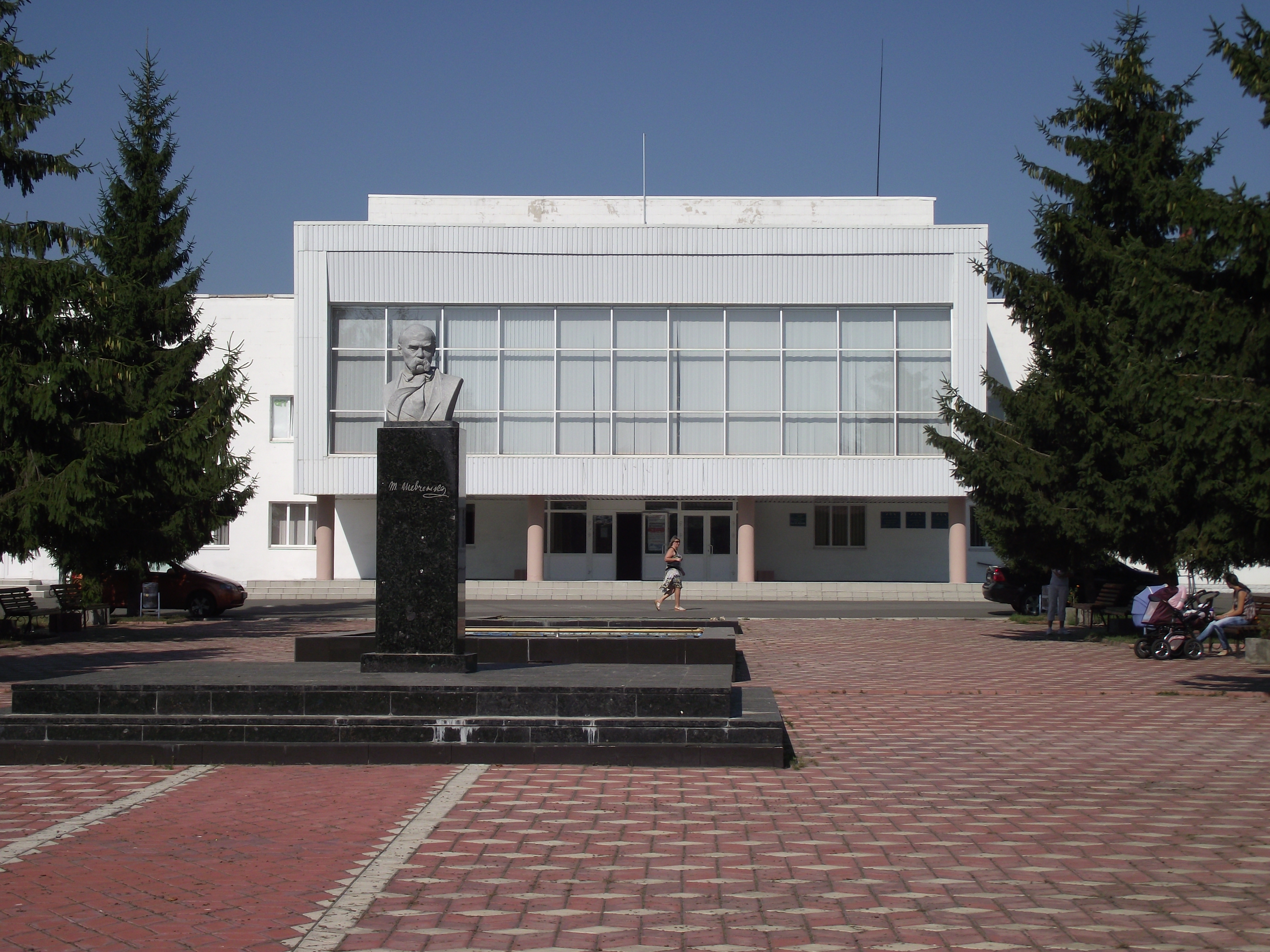 Макарівський будинок культури.